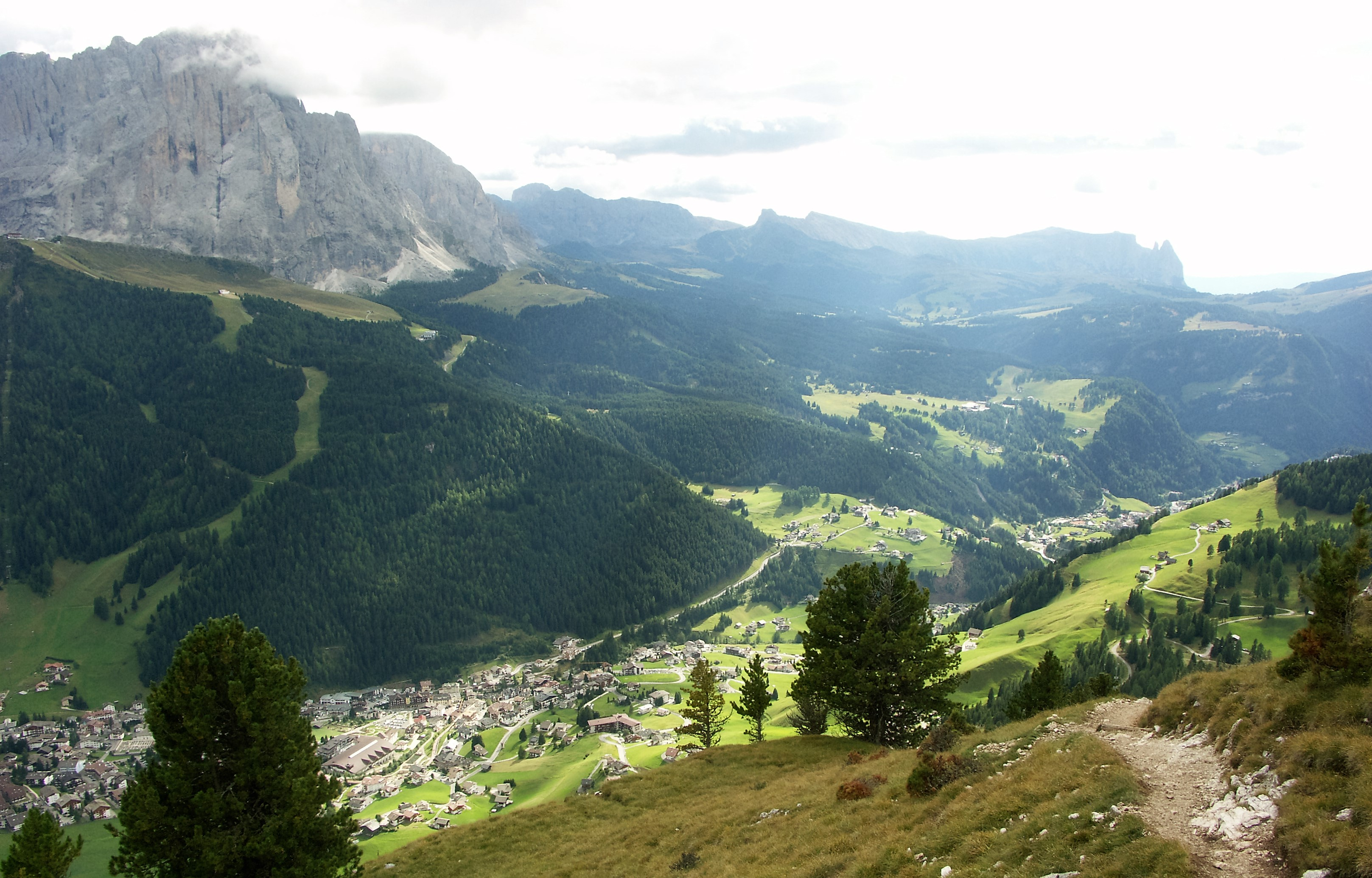 Wolkenstein, Blick vom Steviaaufstieg talabwärts, im Hintergrund rechts der Schlern mit der Santner Spitze